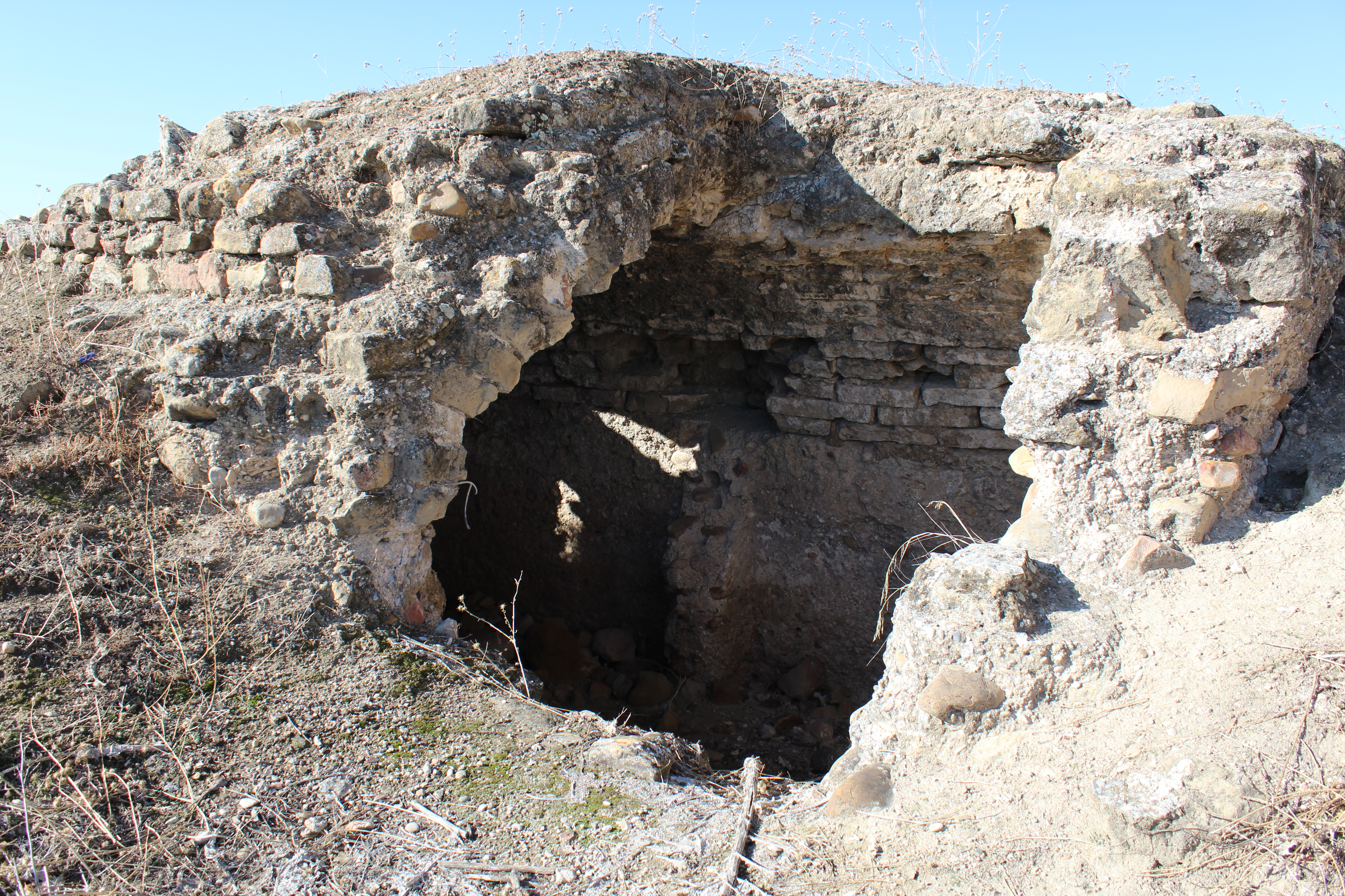 Vista del aljibe del Castillo de las Huelgas.